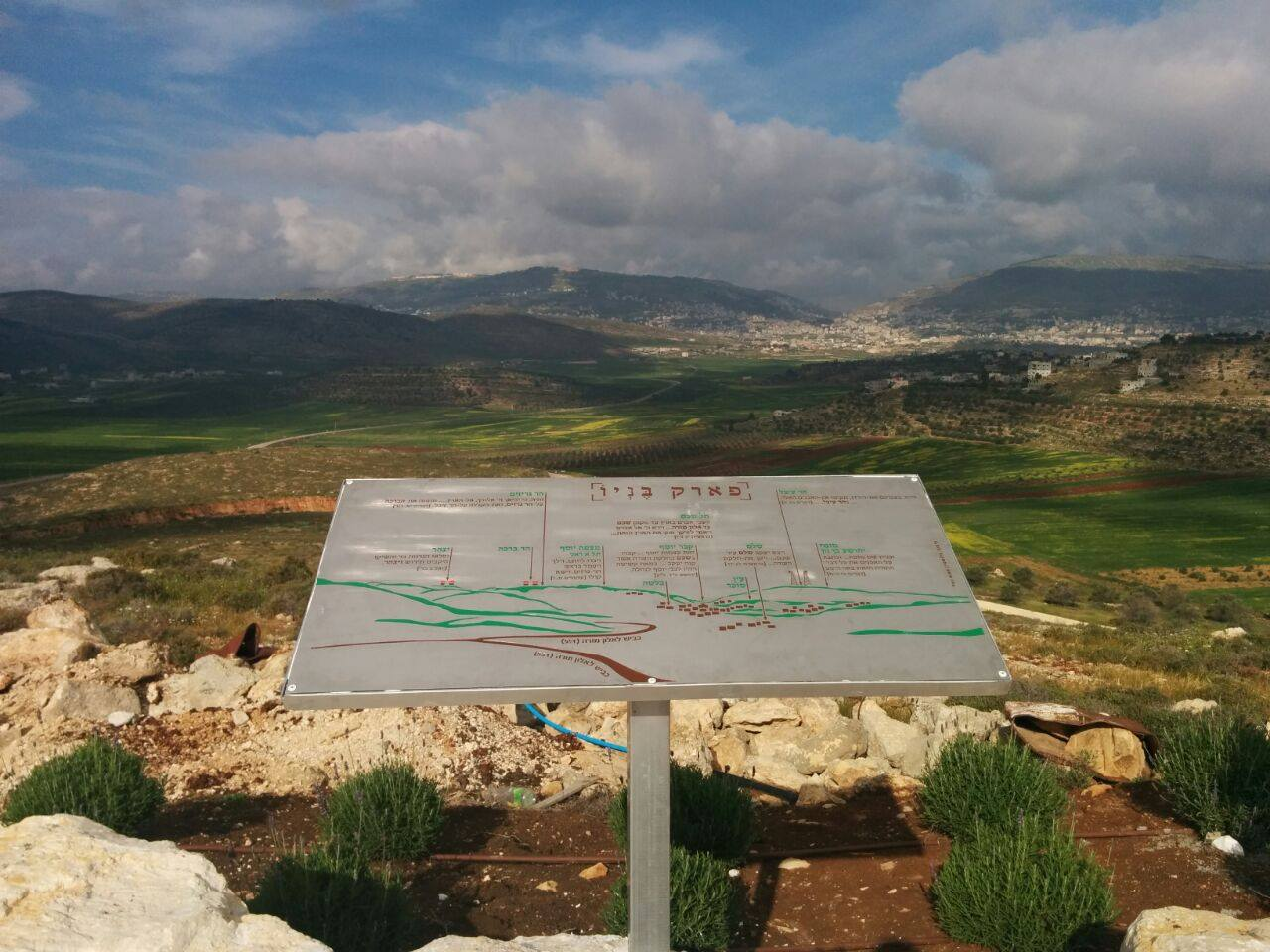 תצפית בניו